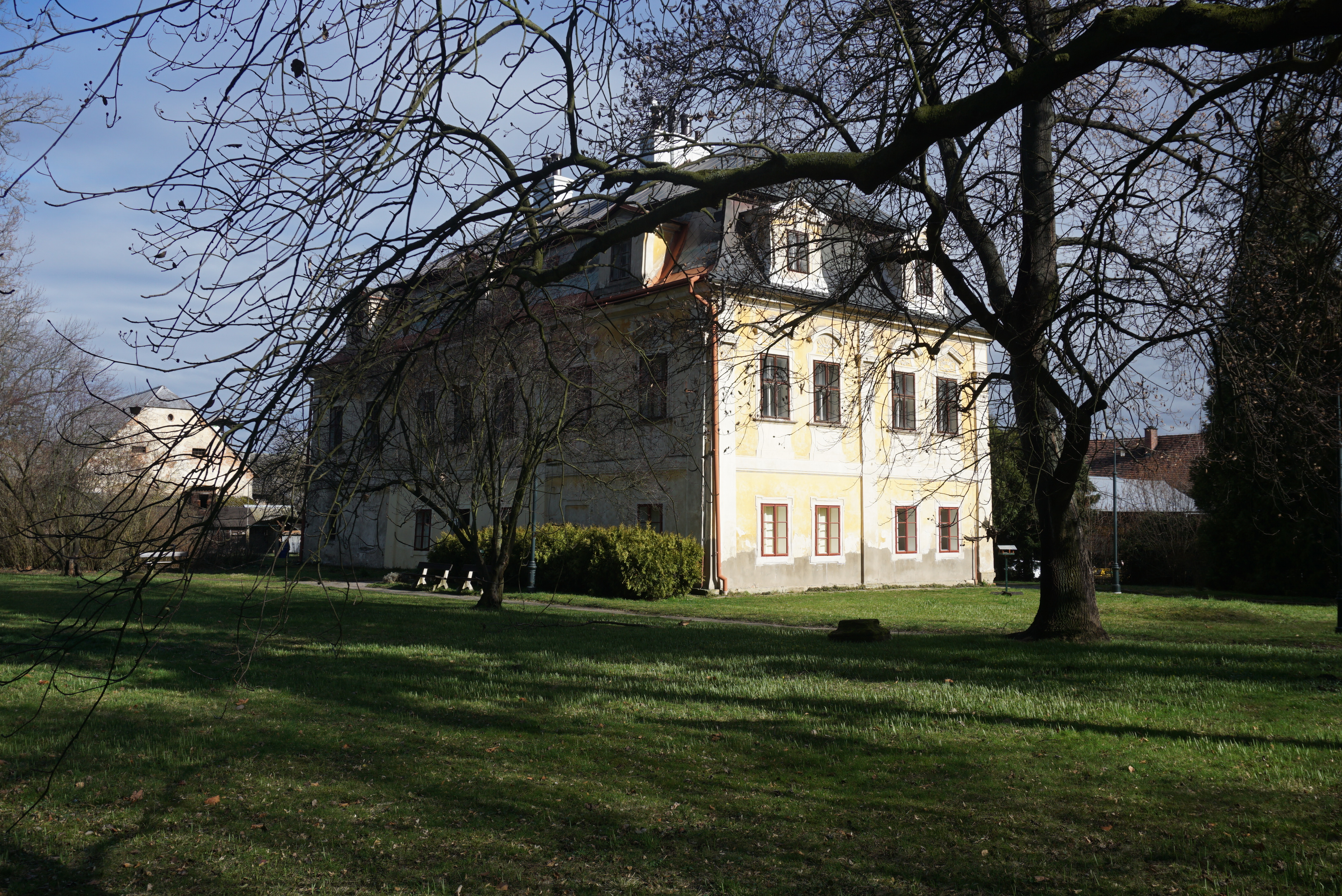 Zámek Medlešice, Medlešice 1, Medlešice.